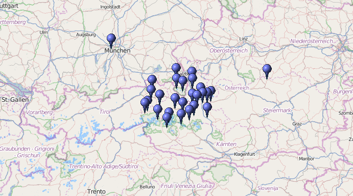 Verbreitung des Toponyms "Palfen" für Felsformationen